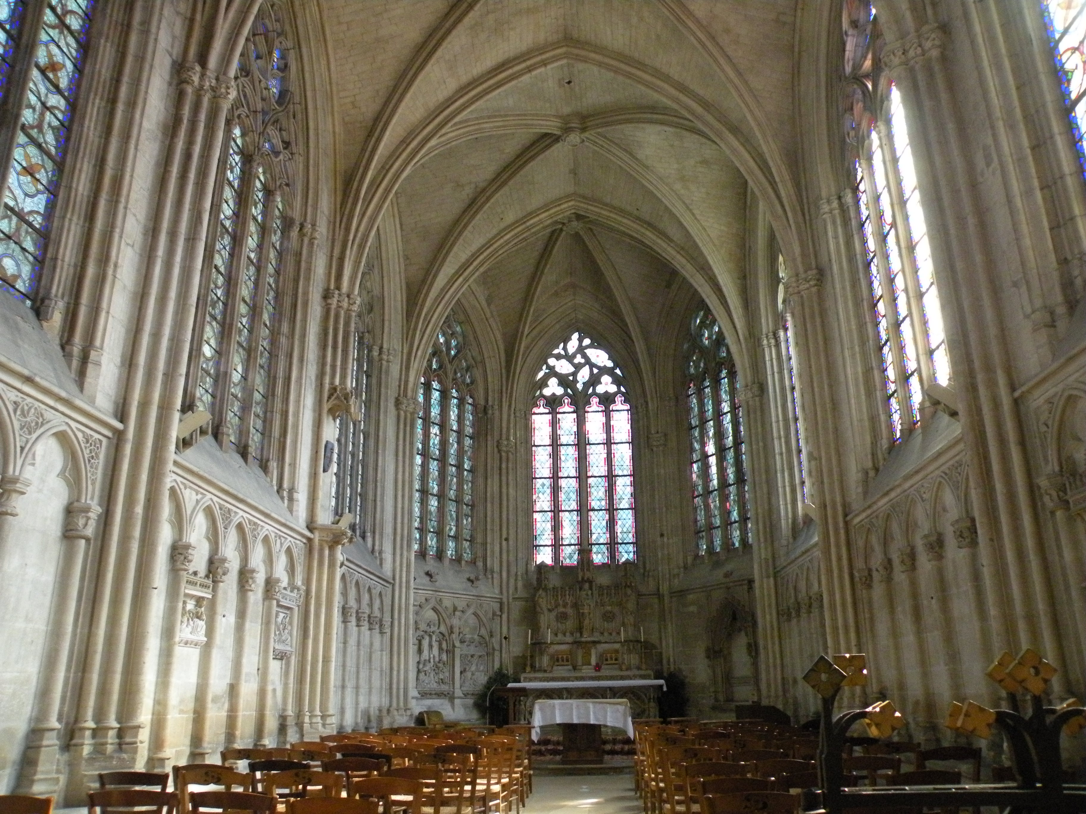 Cathédrale Saint-Pierre de Lisieux